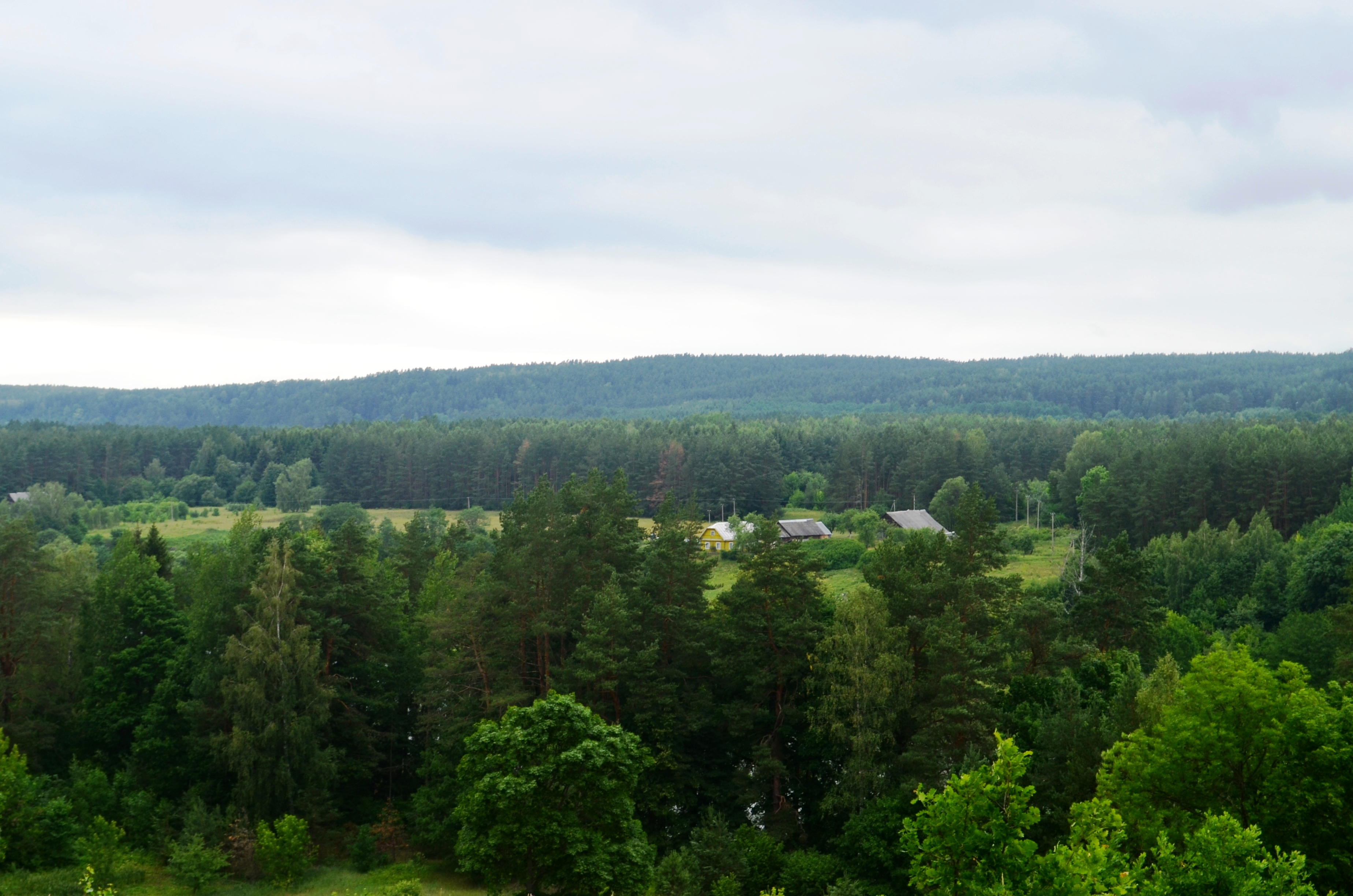 Saidžiai nuo Stirnių piliakalnio, Vilniaus raj.